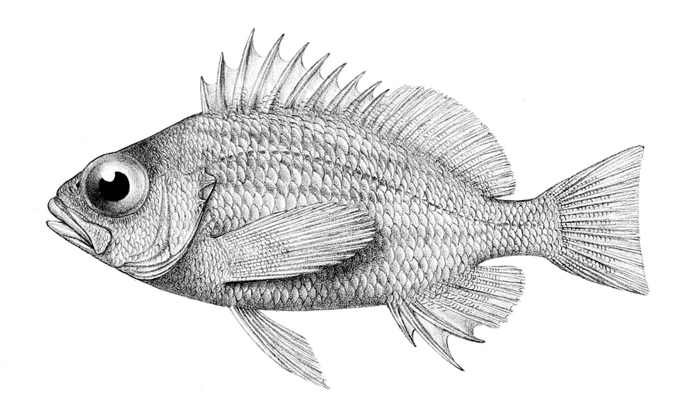 Lepidoperca inornata